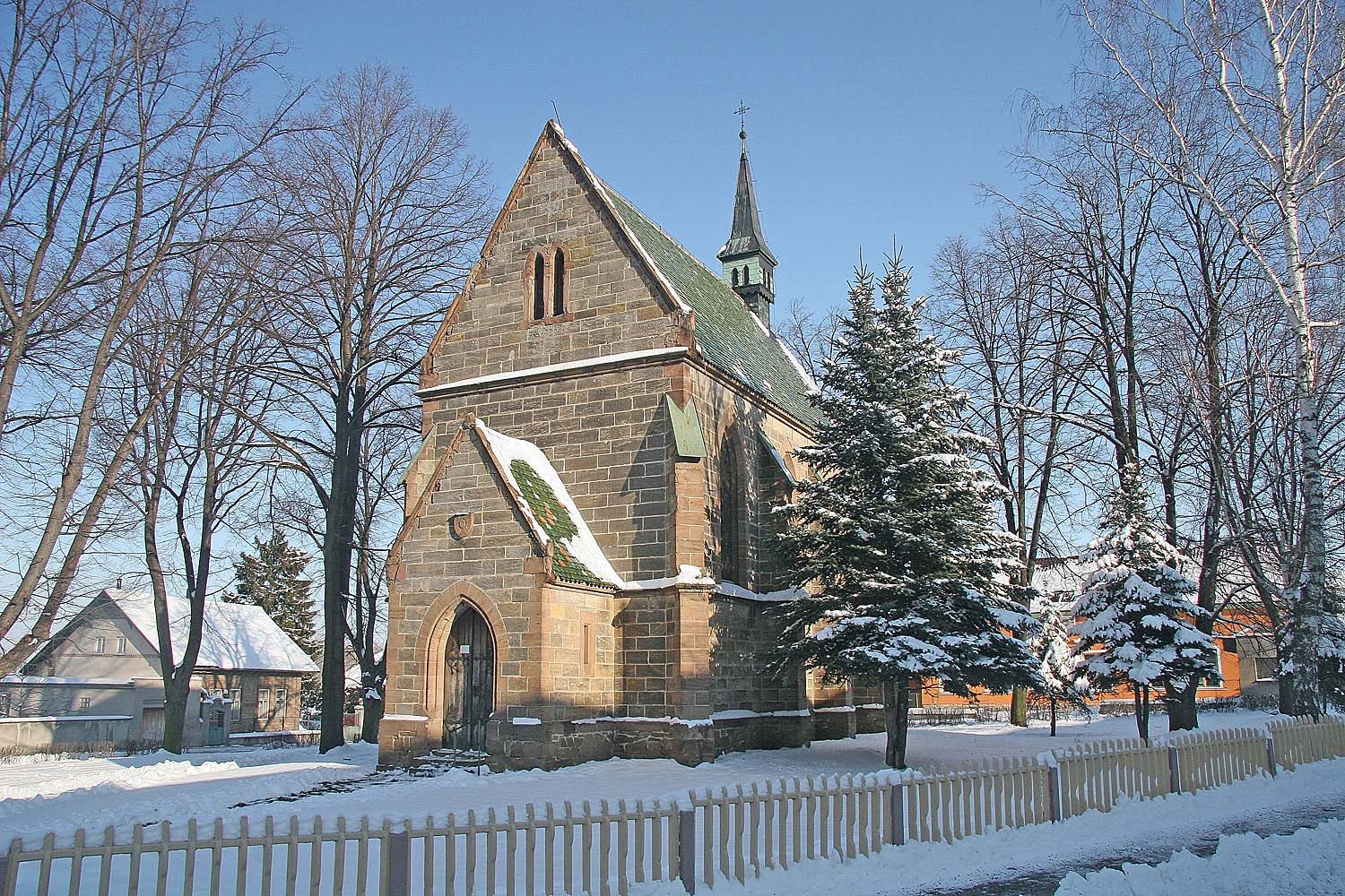 Radim - novorománská kaple Vykupitele z roku 1896. District Kolín autor:Prazak date: 26. 1. 2007